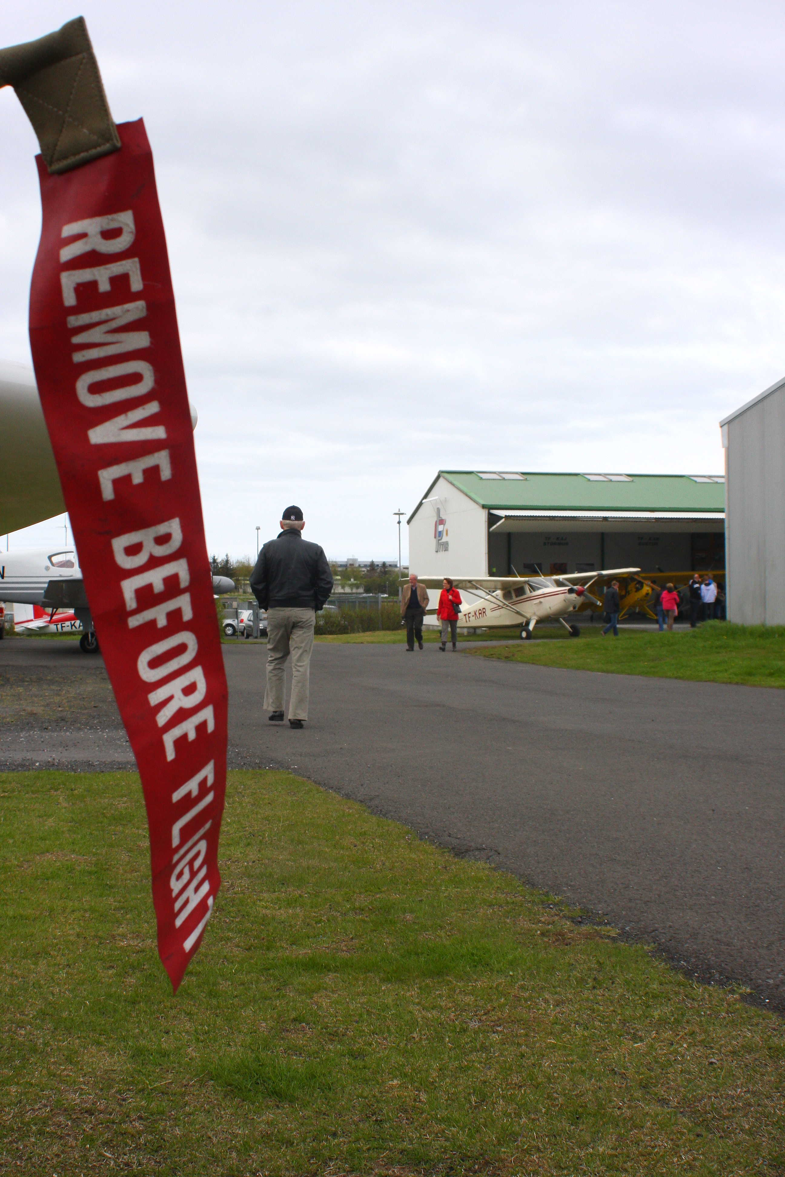 Remove before flight